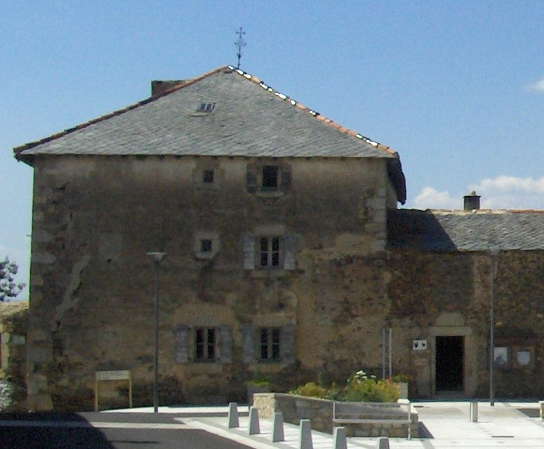 Museu de Cerdanya a la masia Cal Mateu de Santa Llocaia (Alta Cerdanya) .